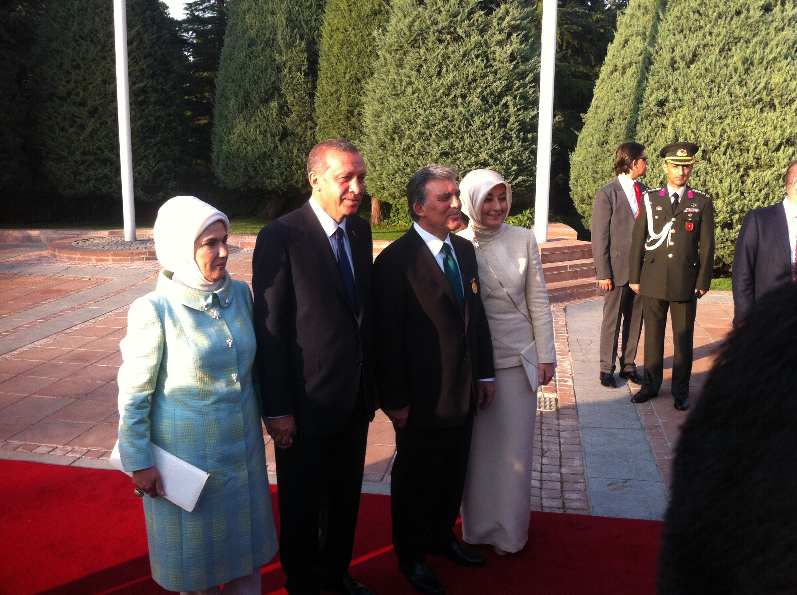 28 Ağustos 2014 tarihinde 11. Türkiye Cumhurbaşkanı Abdullah Gül'ün 12. Türkiye Cumhurbaşkanı Recep Tayyip Erdoğan'ı devir teslim töreni için ağırladığı Çankaya Köşkü'nde çekilen bir fotoğraf.